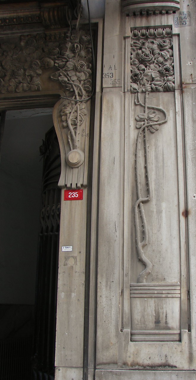 Art Nouveau doorway on İstiklal Caddesi in Istanbul